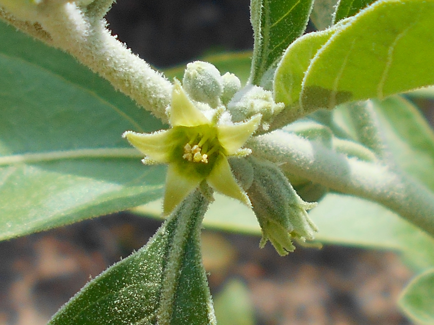 Witania ospała (Withania somnifera), Botanischer Garten Berlin.